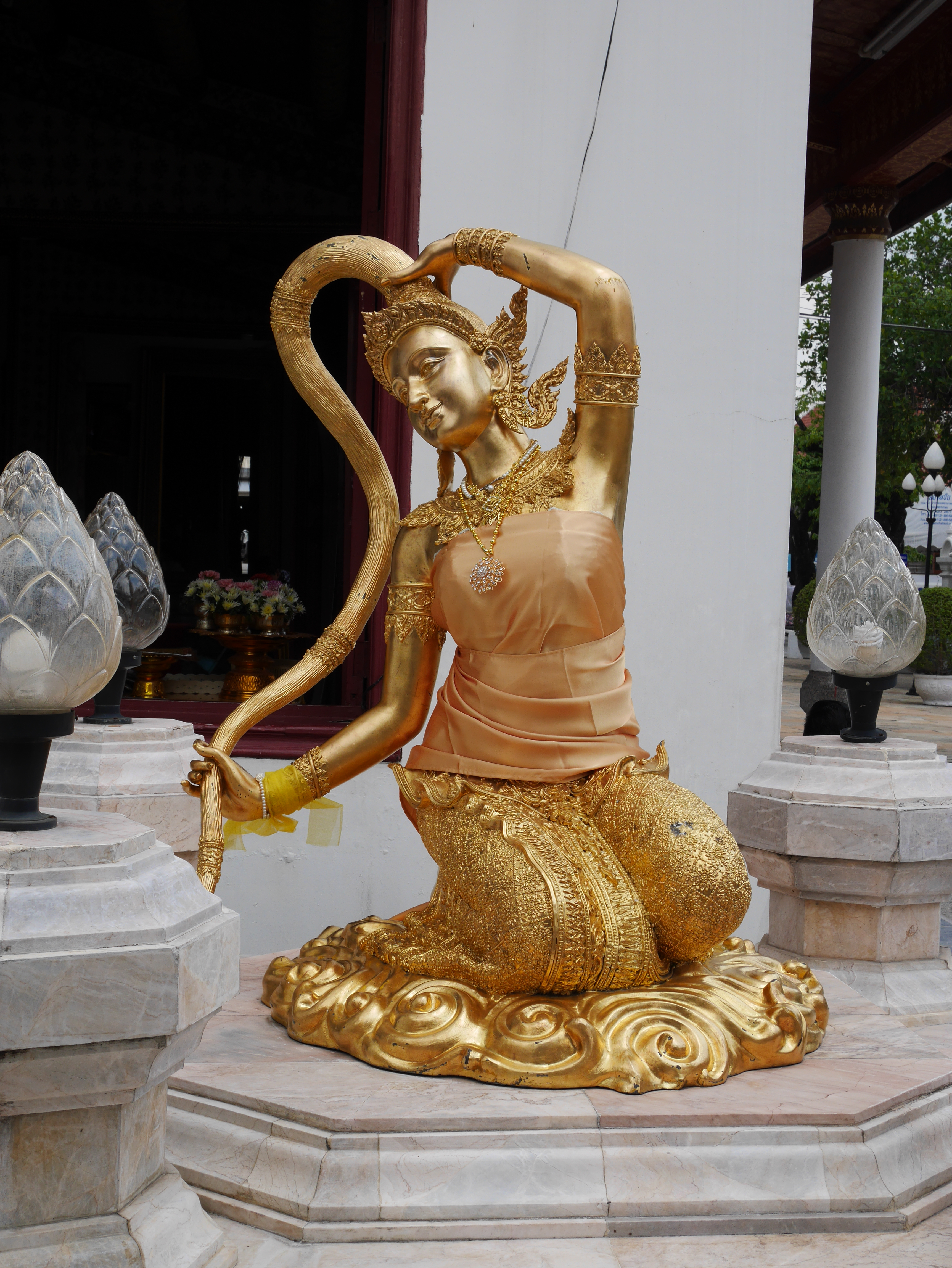 วัดพิชยญาติการาม